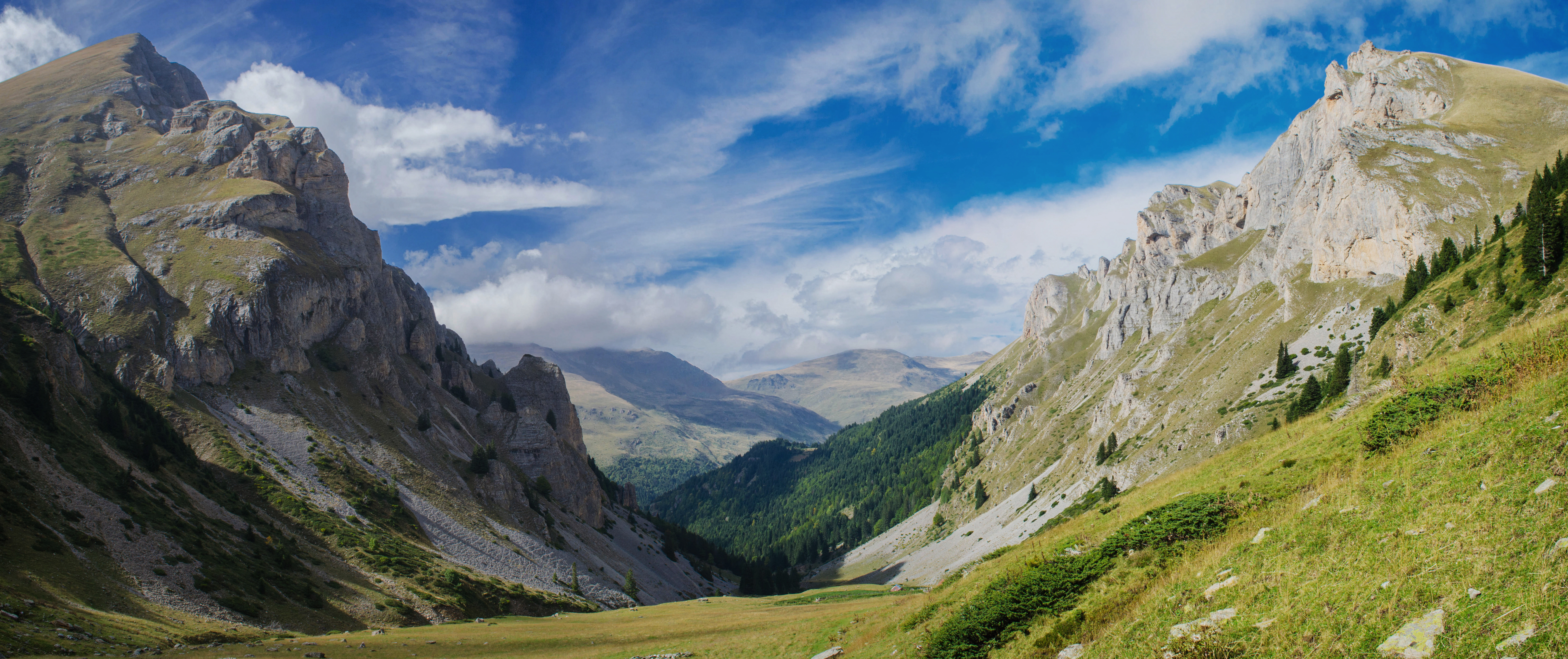 Поглед кон долината на Бозовска река, Горна Лешница, меѓу Среден Камен и Плат, Шар Планина